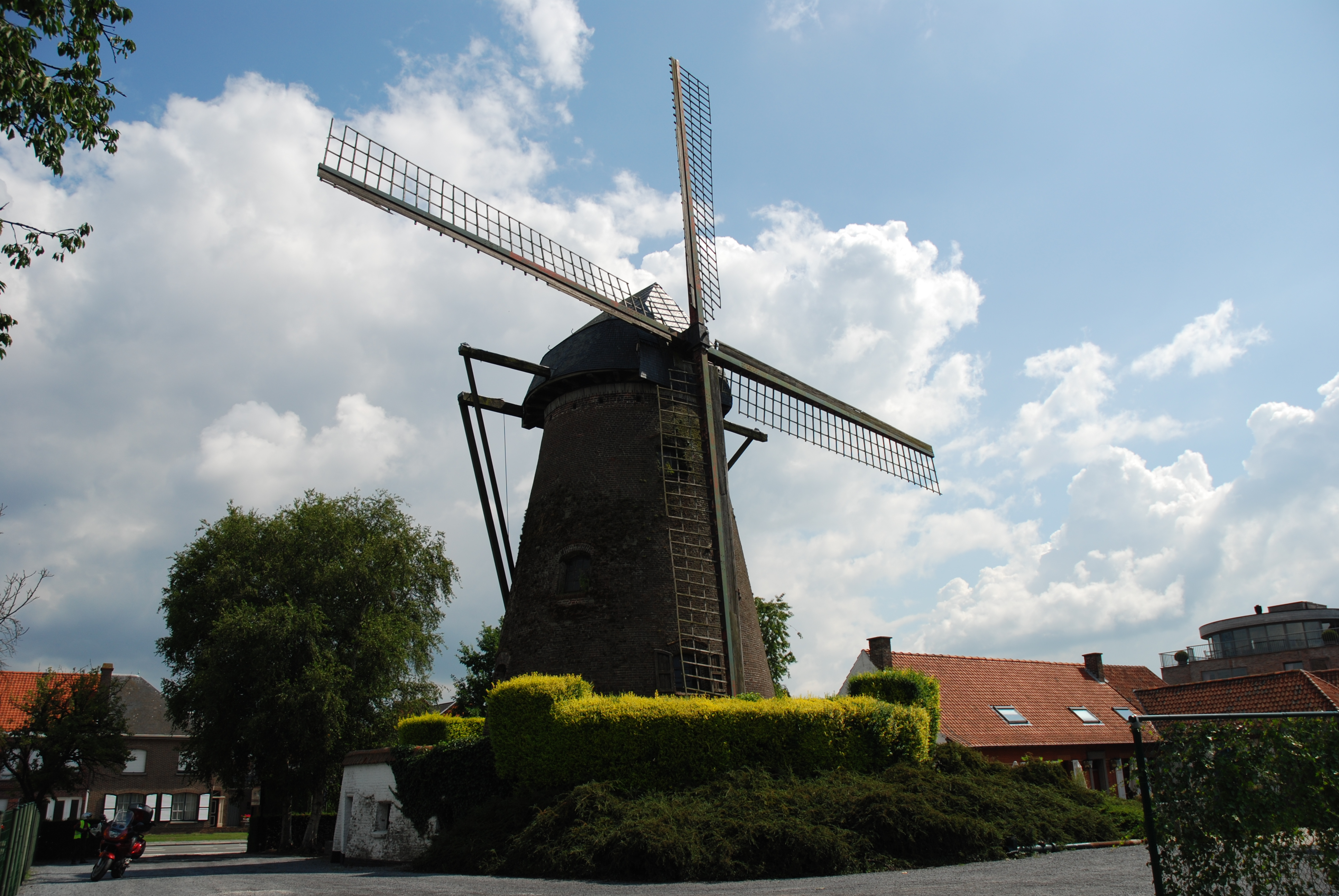 De Windmolen te Zwijnaarde, België